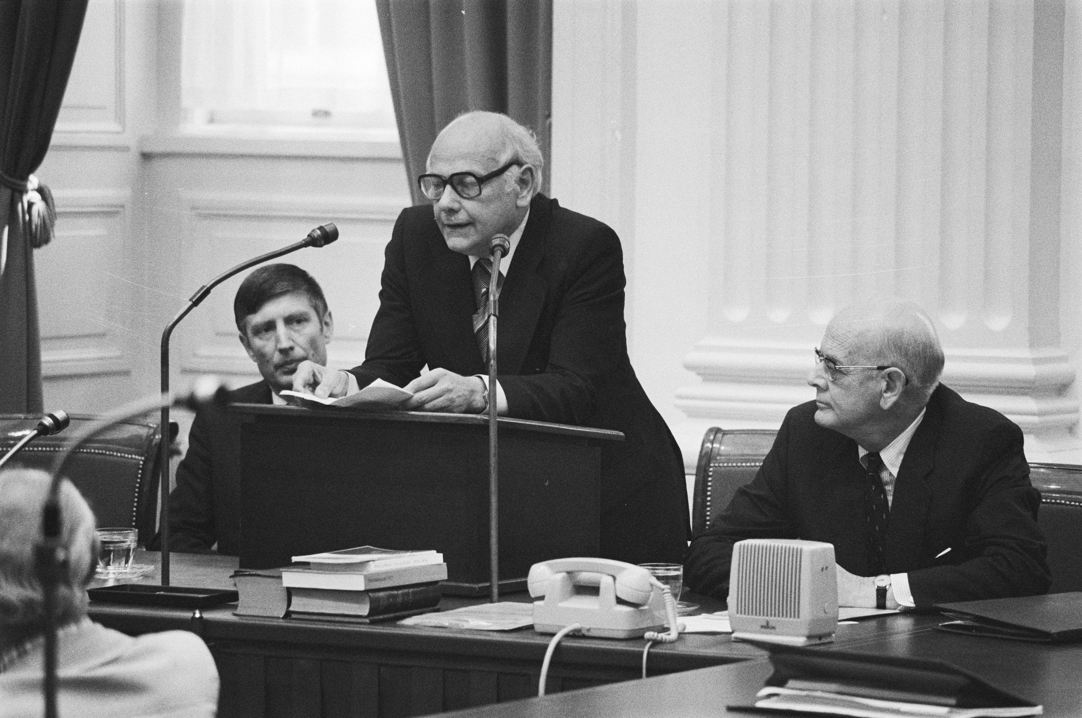 Collectie / Archief : Fotocollectie Anefo Reportage / Serie : [ onbekend ] Beschrijving : Verklaring Den Uyl over afloop gijzelingen; Den Uyl tijdens afleggen verklaring links minister Van Agt , rechts De Gaay Fortman Datum : 14 juni 1977 Locatie : Bovensmilde, De Punt, Den Haag Trefwoorden : gijzelingen, ministers, politiek Persoonsnaam : Agt, Dries van, Gaay Fortman De, Uyl, Joop den Fotograaf : Suyk, Koen / Anefo Auteursrechthebbende : Nationaal Archief Materiaalsoort : Negatief (zwart/wit) Nummer archiefinventaris : bekijk toegang 2.24.01.05 Bestanddeelnummer : 929-2294